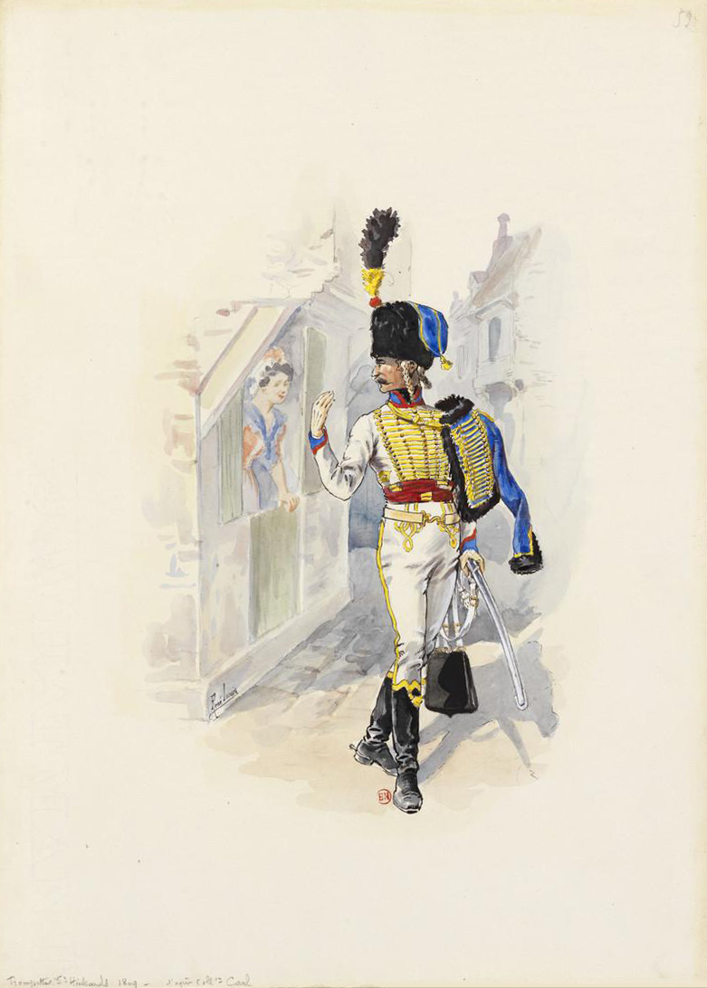 Trompette du 5e Hussards d'après la collection Cral en 1809.